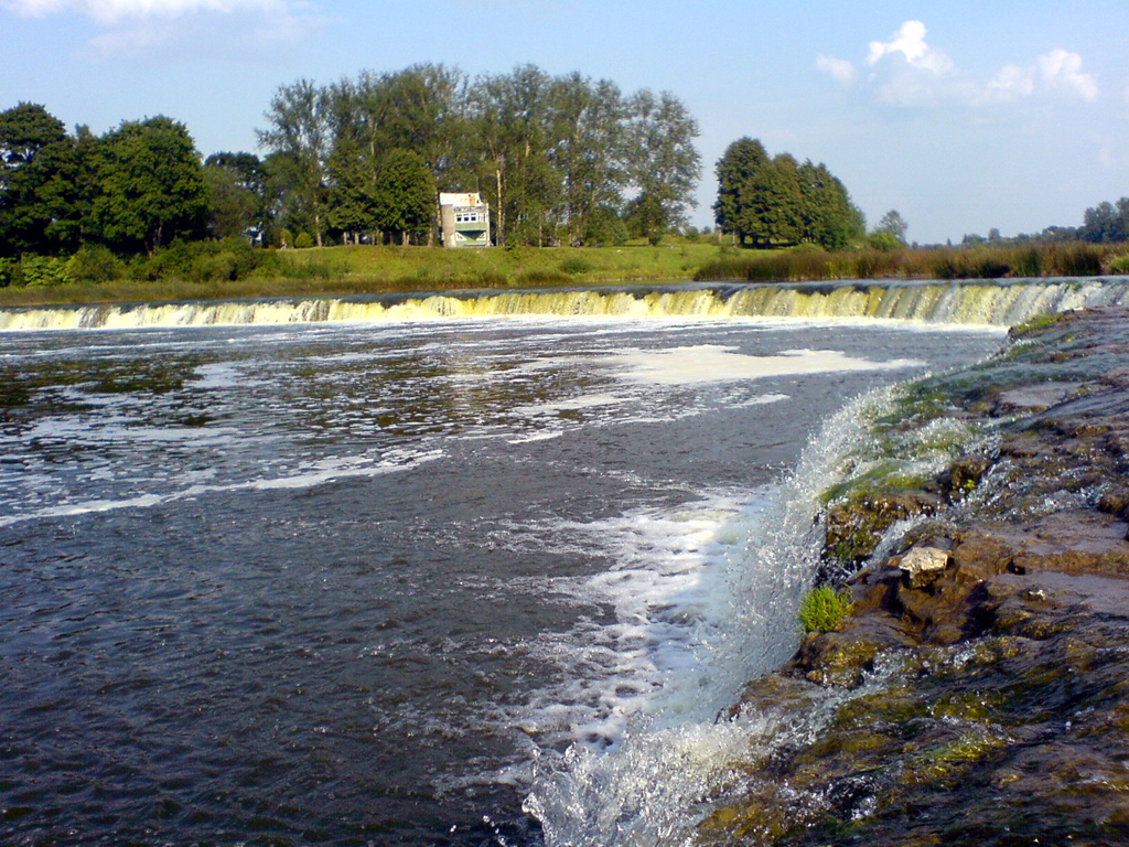 Wasserfall "Ventas Rumba" Ansicht vom Südufer, Kuldiga, Latvija